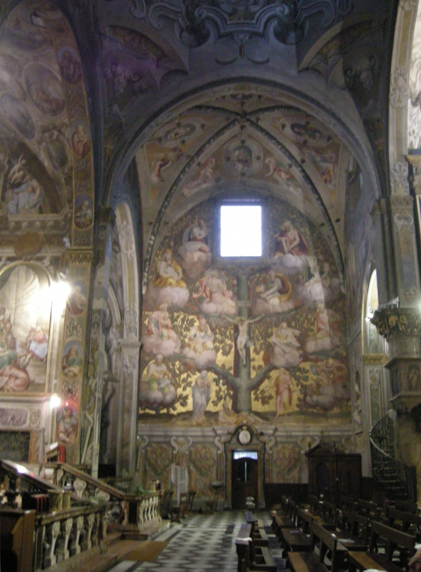 Duomo di monza, affreschi di giuseppe arcimboldo